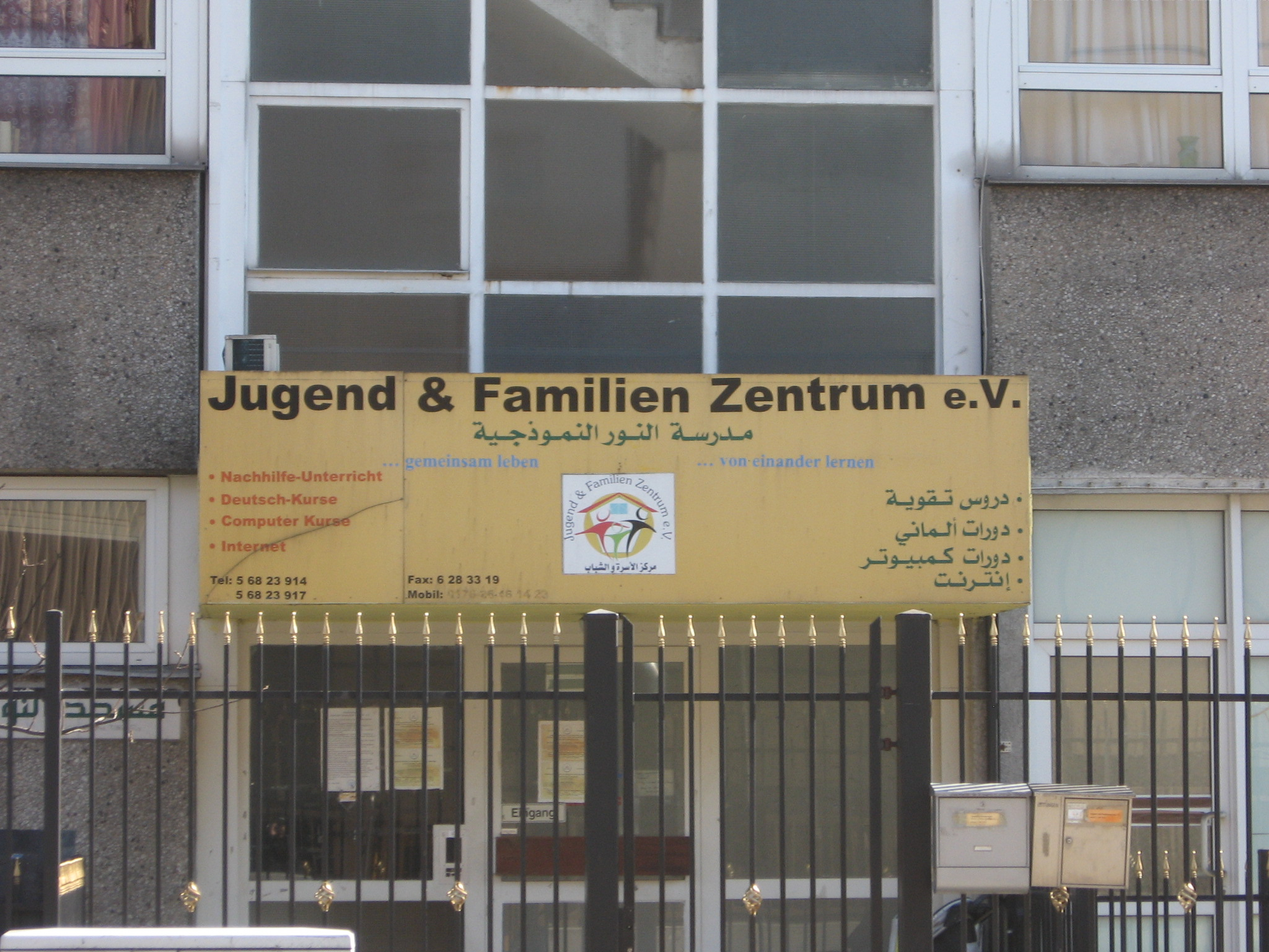 Schild des Vereins Jugend & Familien Zentrum e. V. am Gebäude der Al-Nur-Moschee.